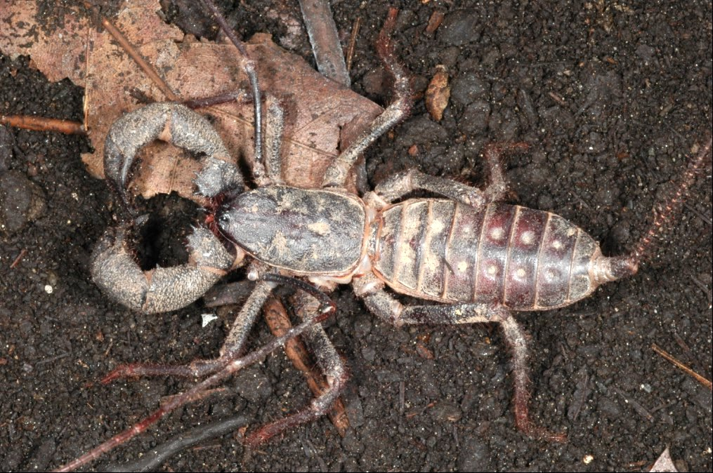 Mastigoproctus giganteus, Uropygi